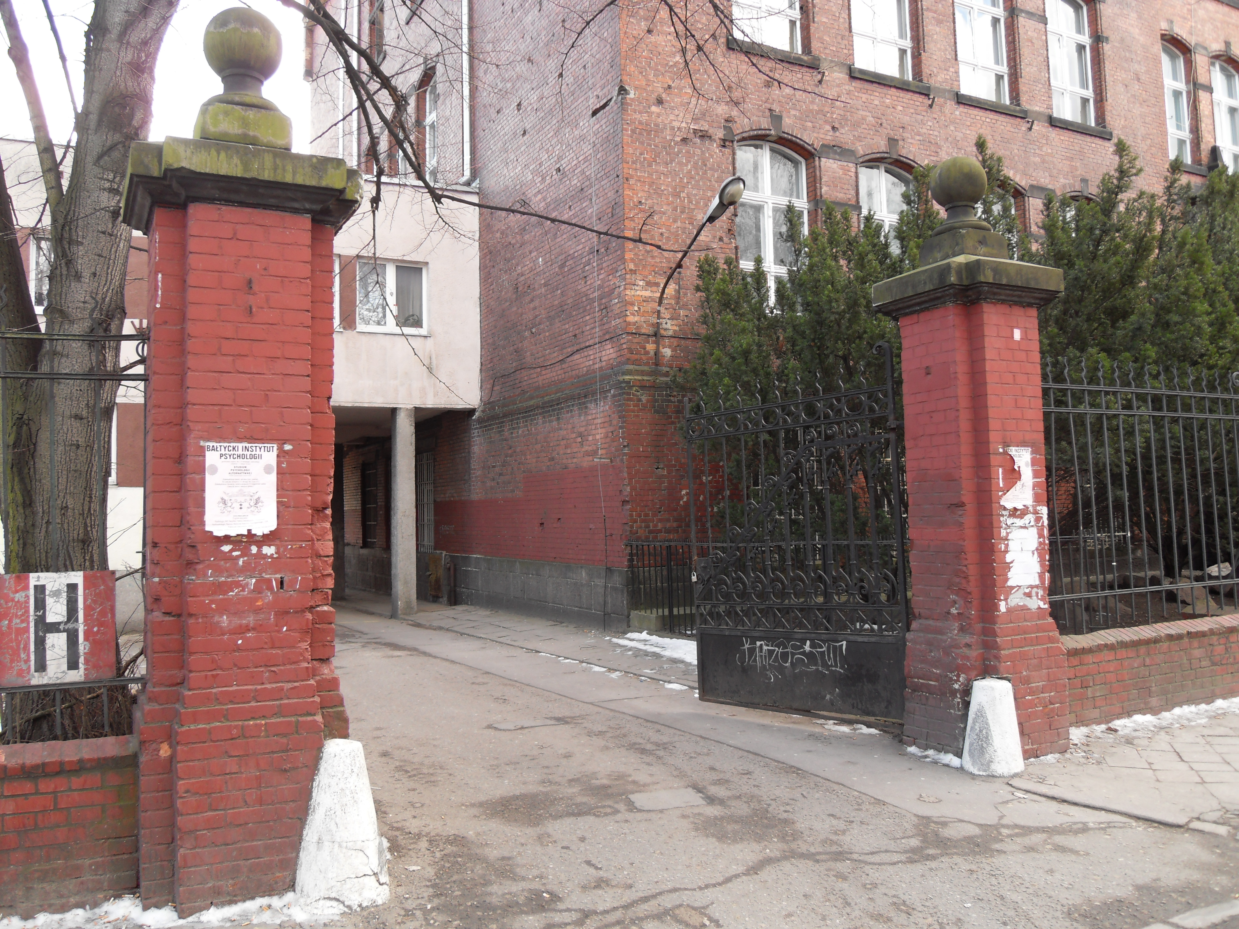 Gdańsk Wrzeszcz, szkoła Conradinum - zabytkowa brama.